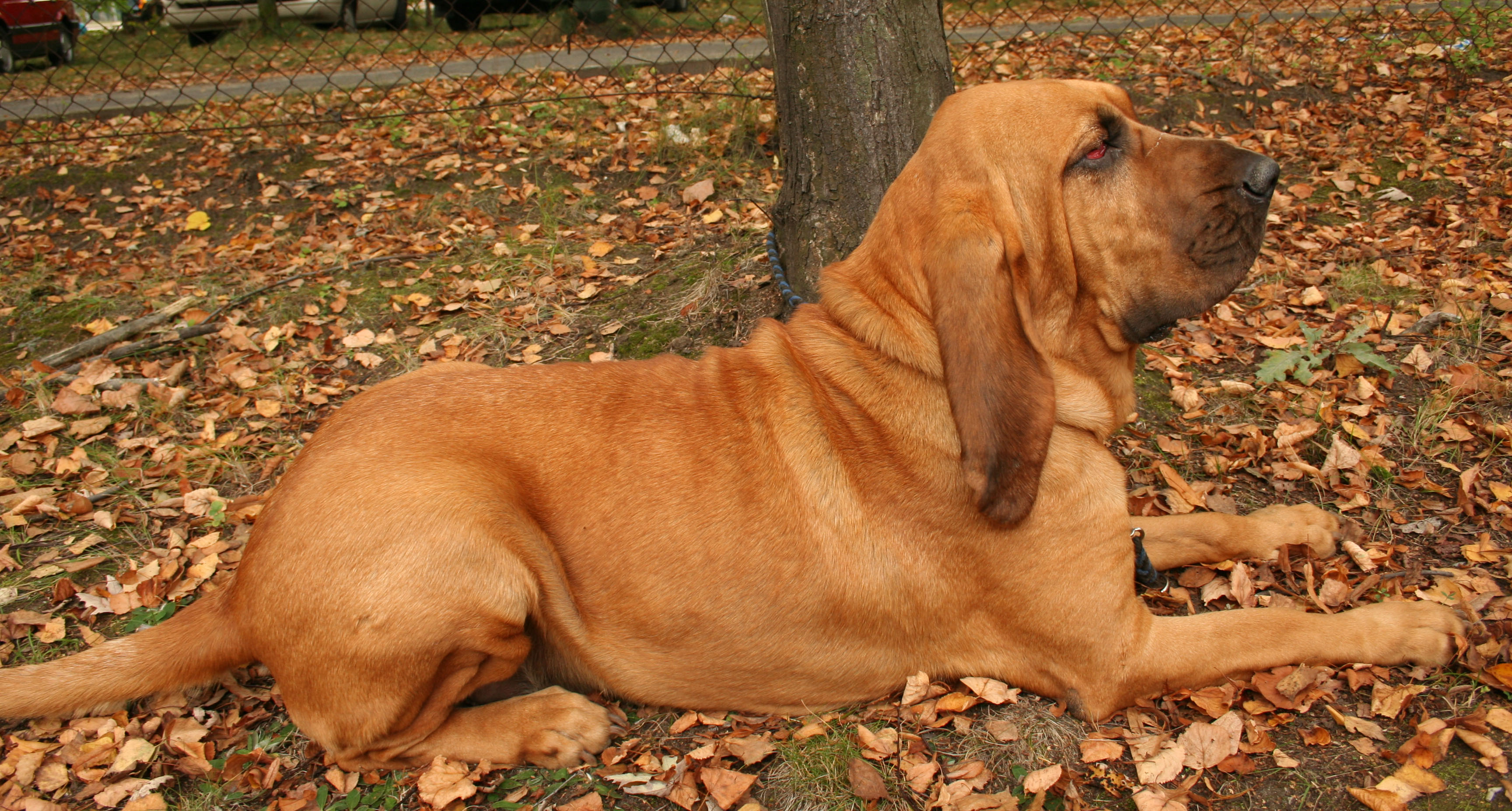 Bloodhund na krajowej wystawie w Rybniku - Kamieniu